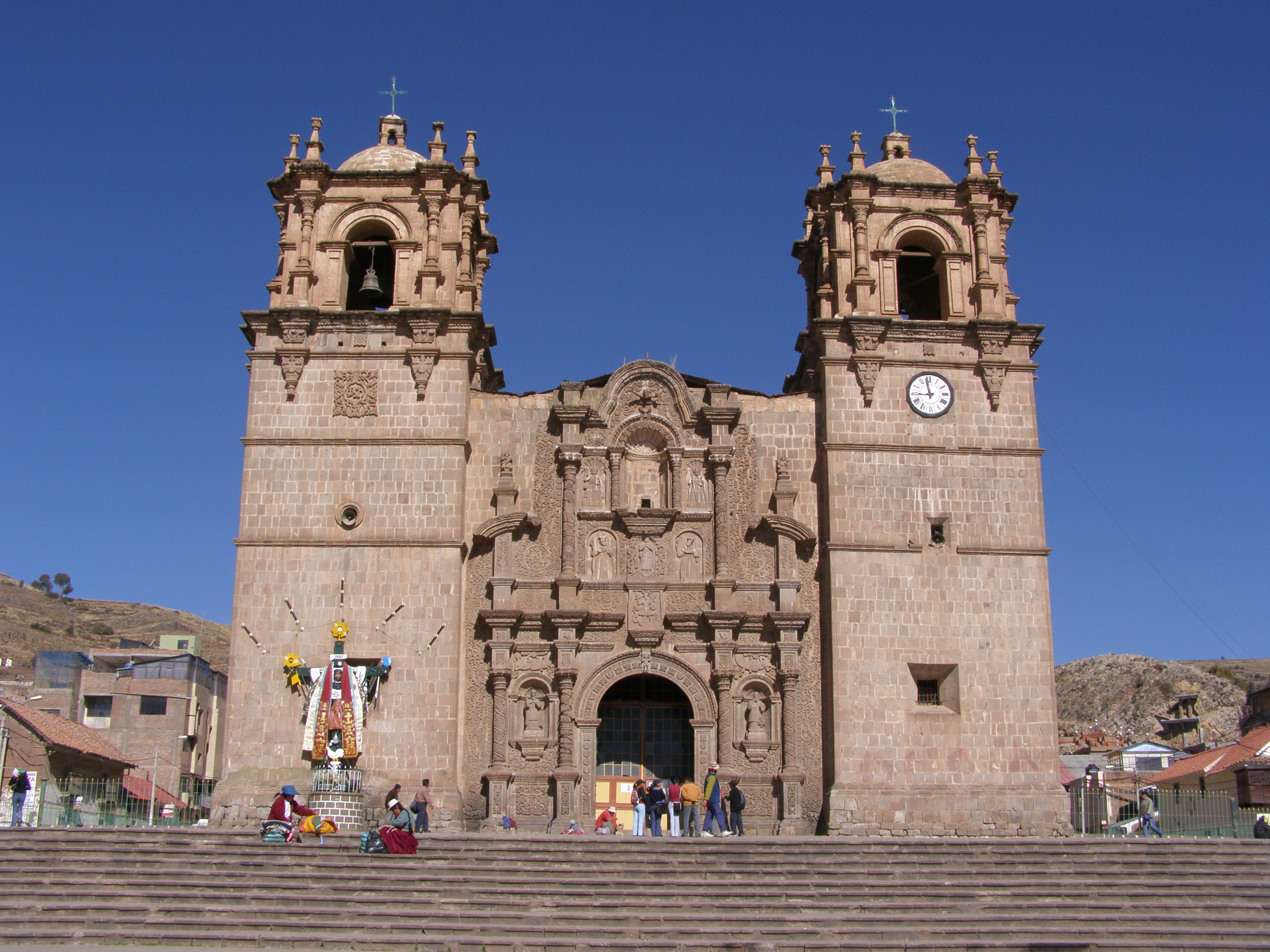 eigen werk